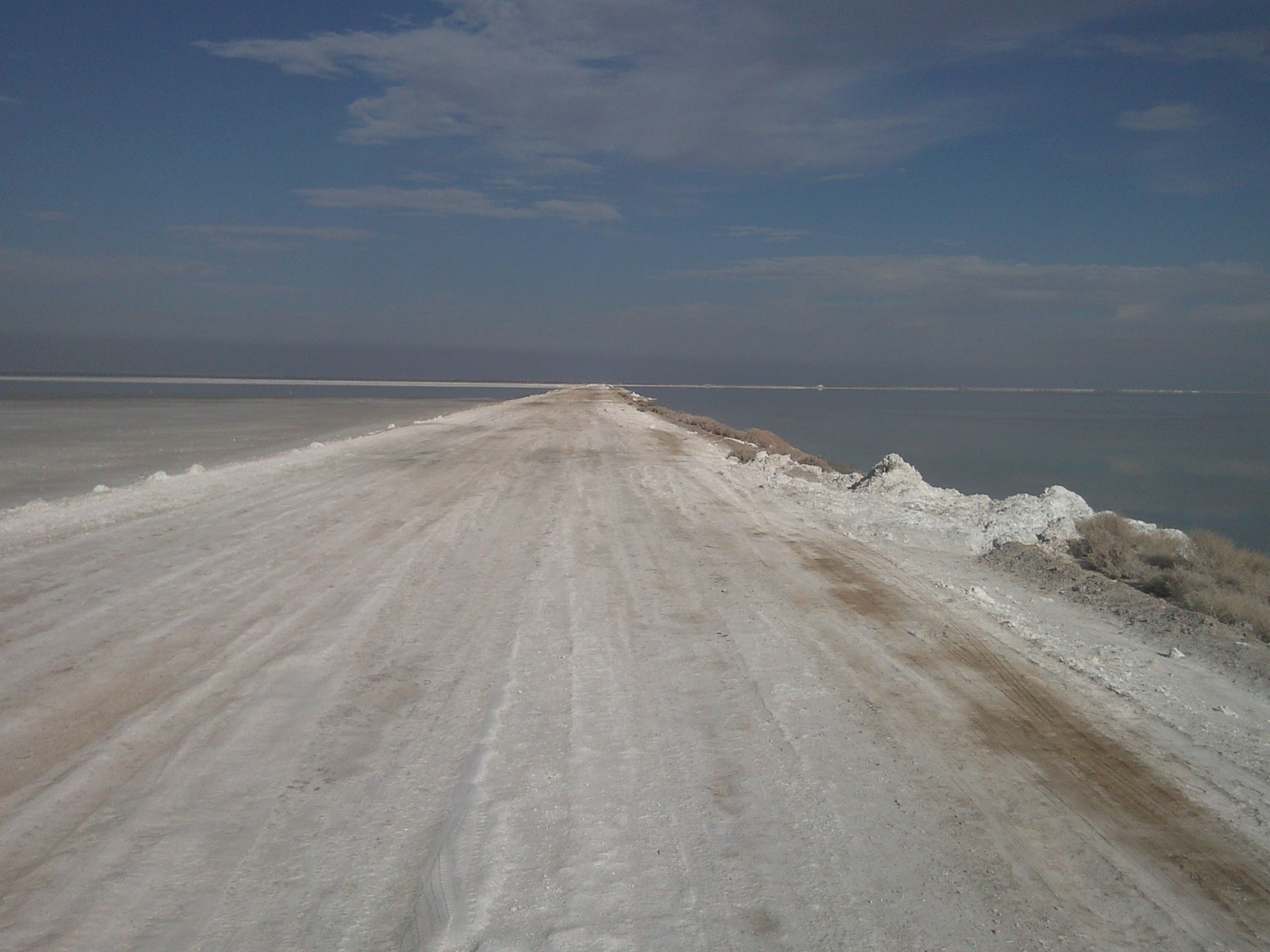 Access road to myga wetland